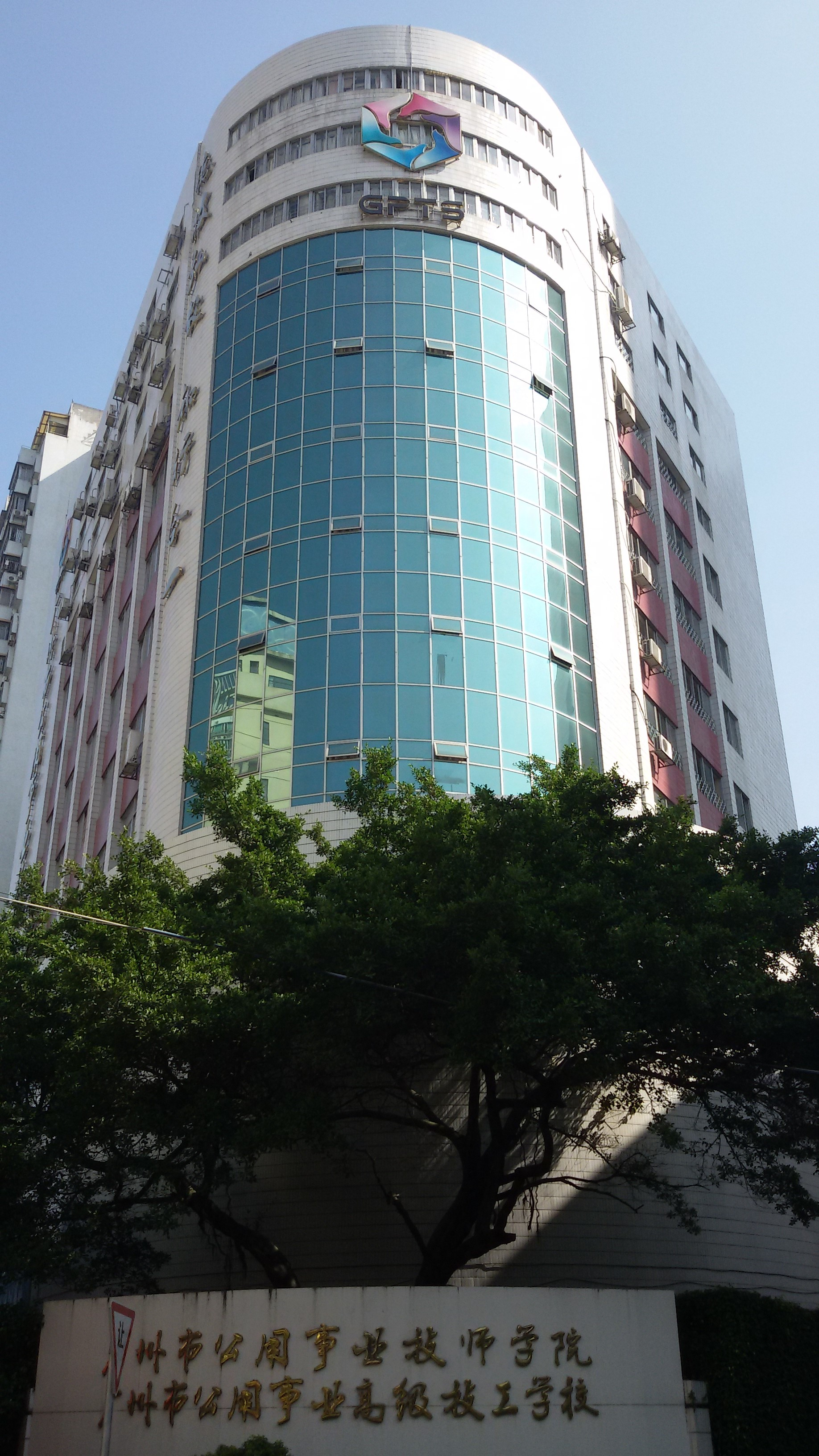 粵語: 廣州市公用事業高級技工學校嘅東華南校區教學樓